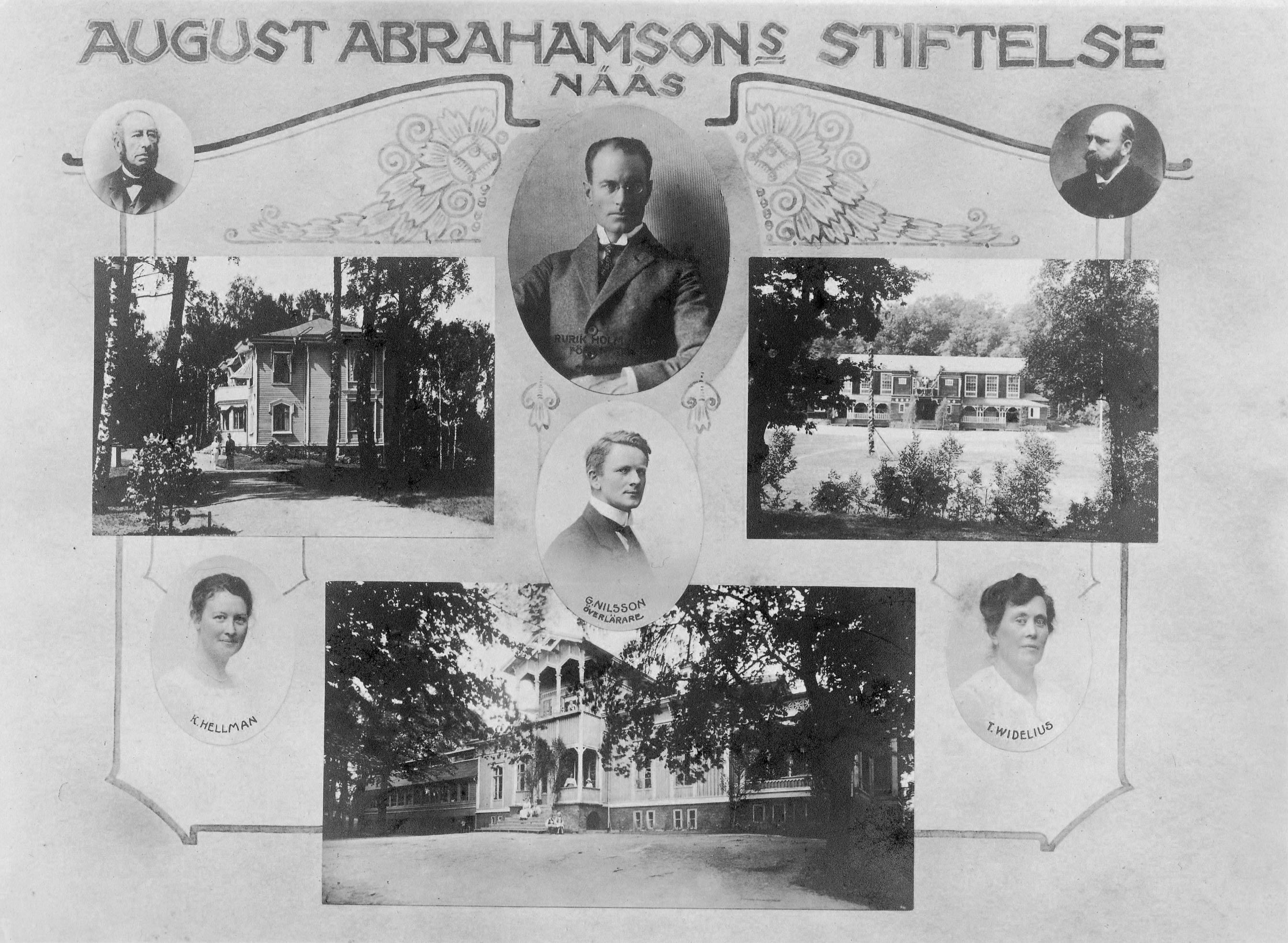 slöjdkurs